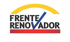 Logo del Frente Renovador de la Concordia Social (Partido provincial de Misiones).